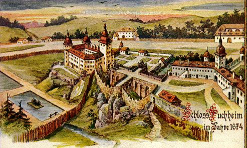 Historische Ansicht der Schlossanlage Puchheim aus dem Jahre 1674, im Hintergrund ist rechts der alte Mayrhof zu sehen welcher zu einer Wohnsiedlung umfunktioniert worden ist, auch zu sehen ist im Hintergrund das Gebäude in der Mitte das jetztige Musikerheim. gesammelt und gehostet von: Andreas Perhab